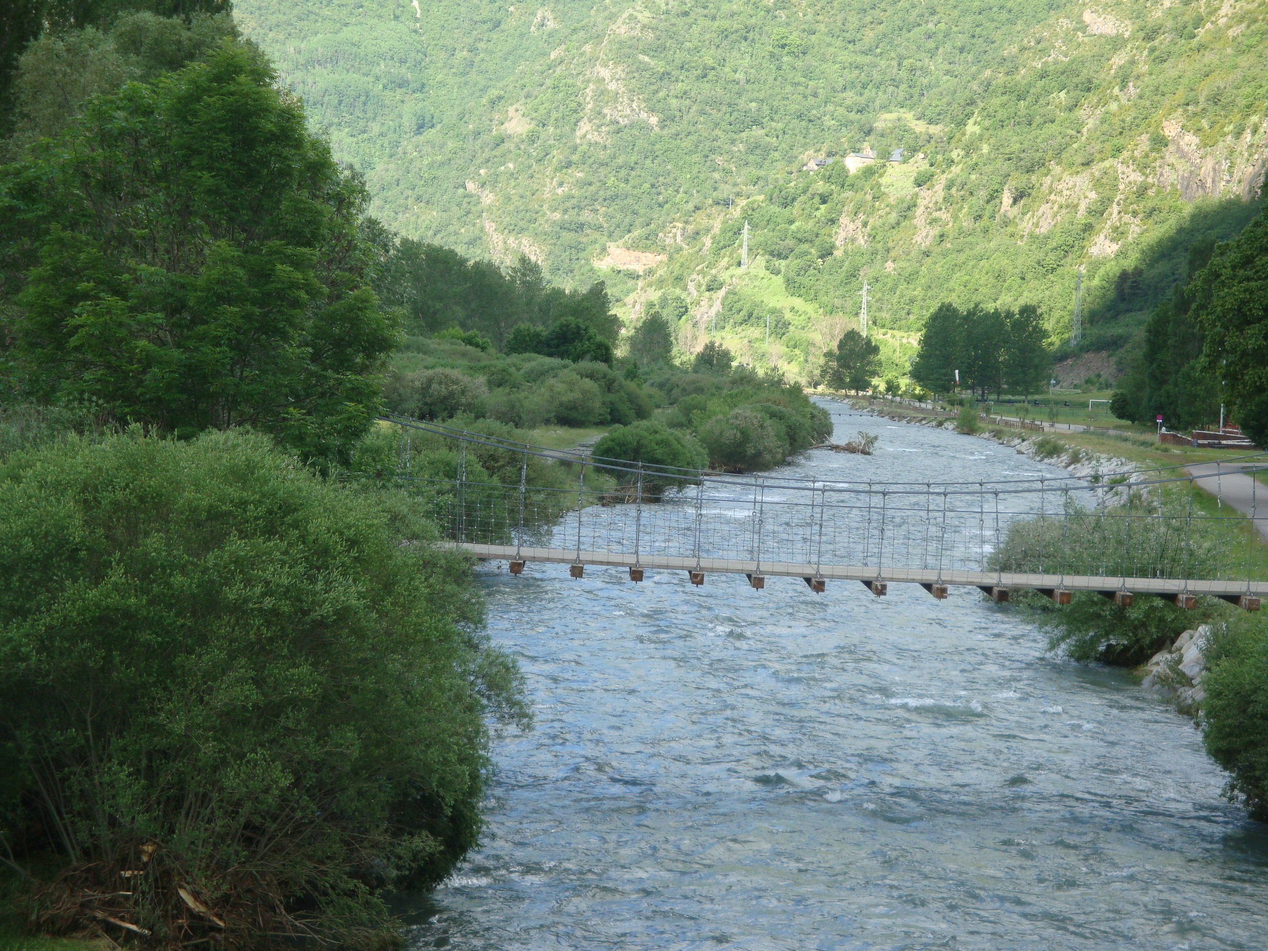 Río Noguera de Tor (Vall de Boí) Lérida